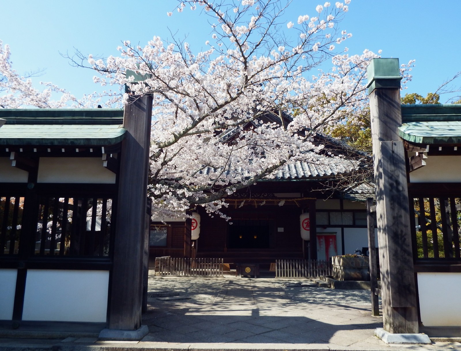 金比羅本教